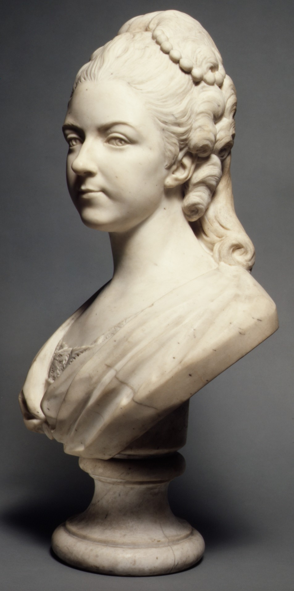 French; Bust; Sculpture